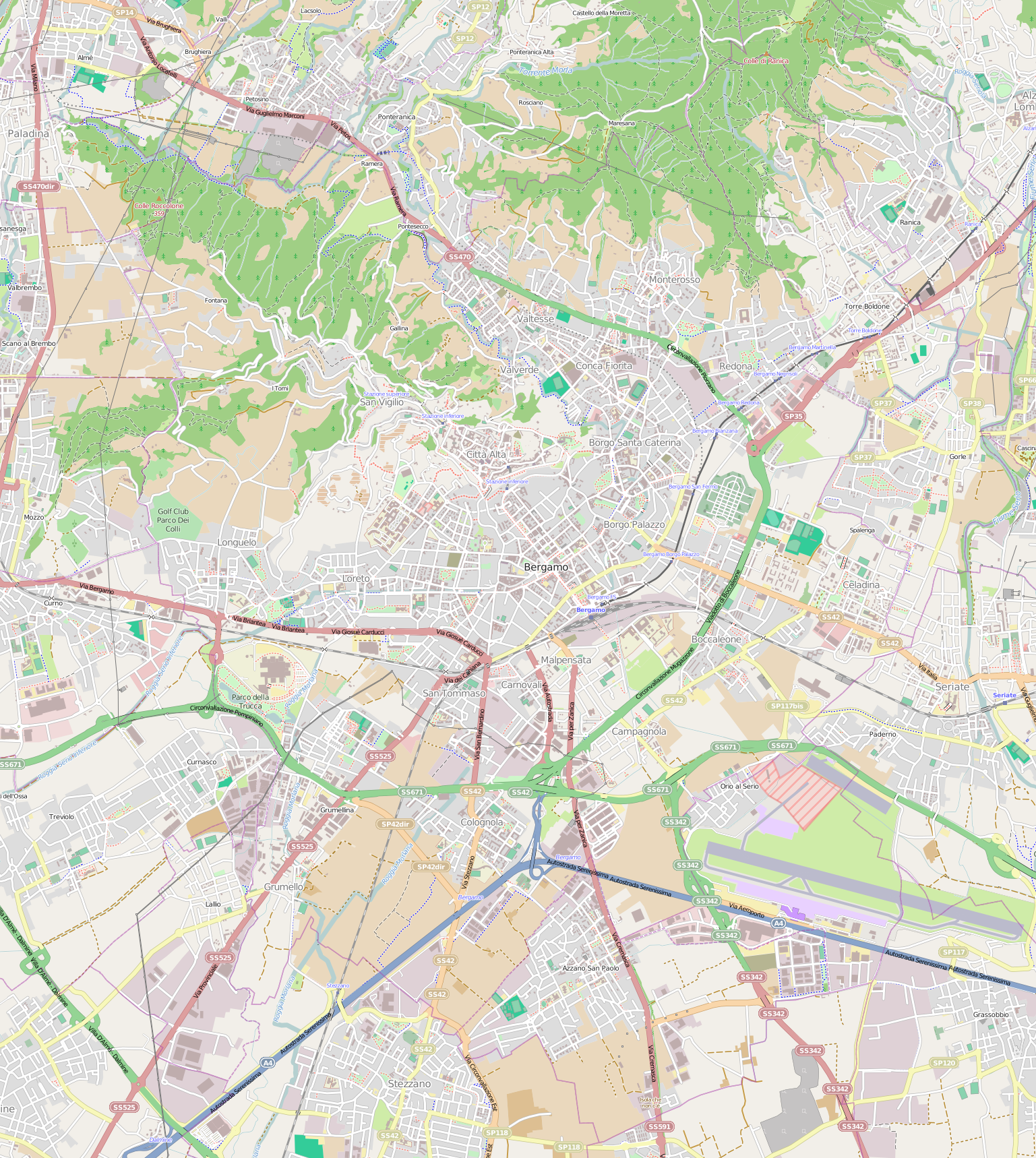 Mappa di Bergamo. Limiti geografici: N: 45.7417° S: 45.6453° O: 9.6047° E: 9.7284°